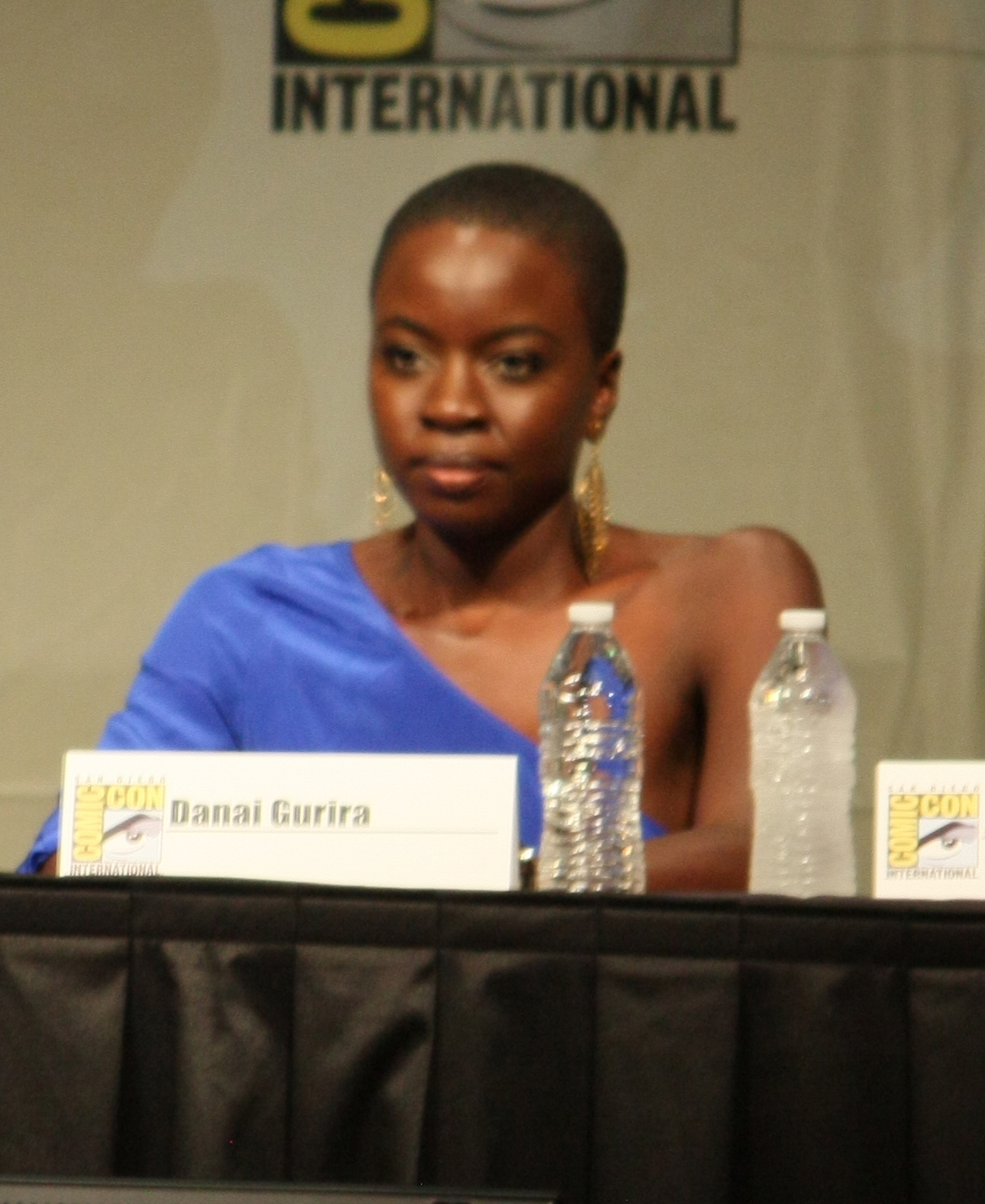 Danai Gurira (Michonne)